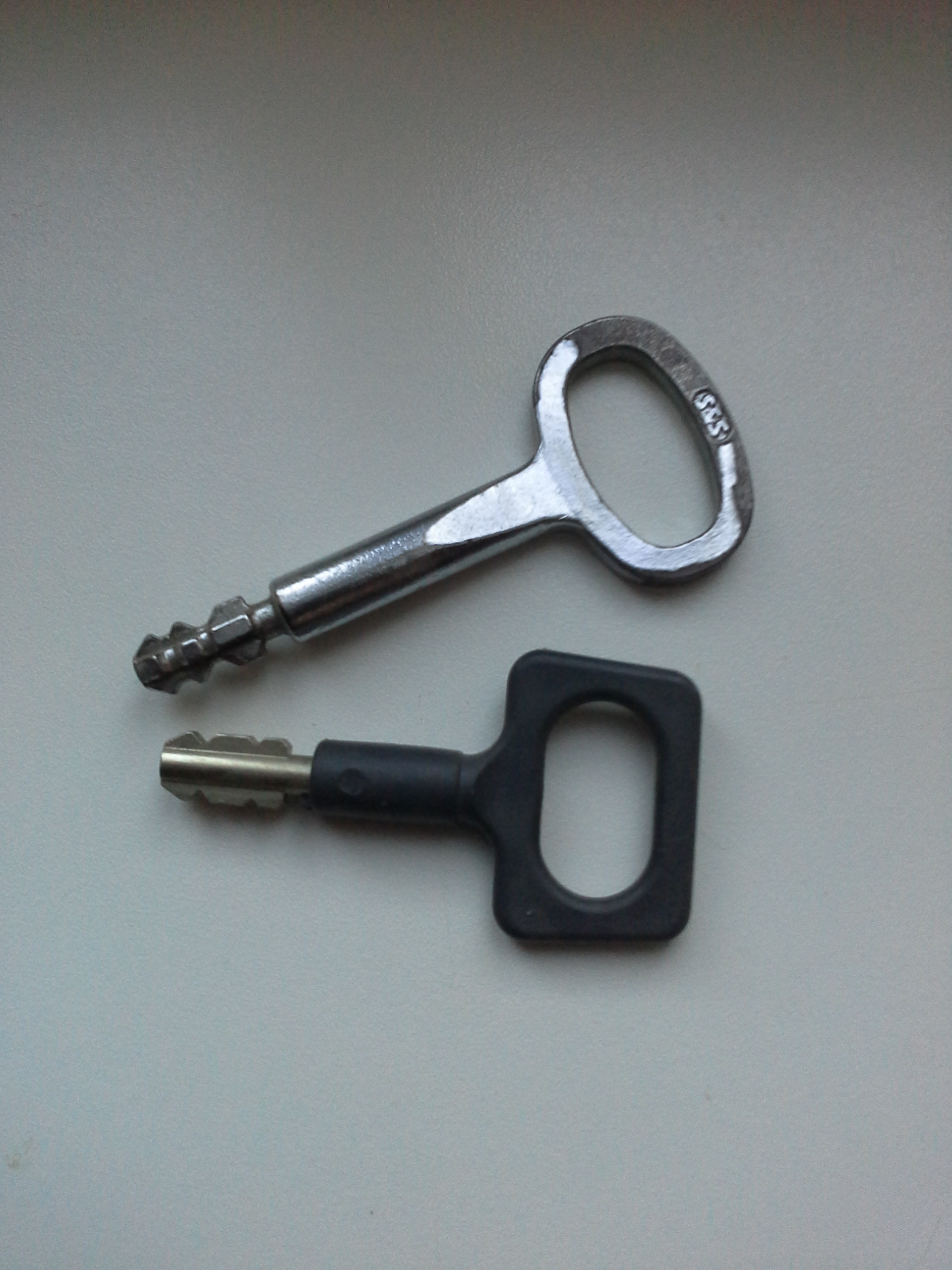 unterschiedliche Kreuzbartschlüssel für das selbe Schloß